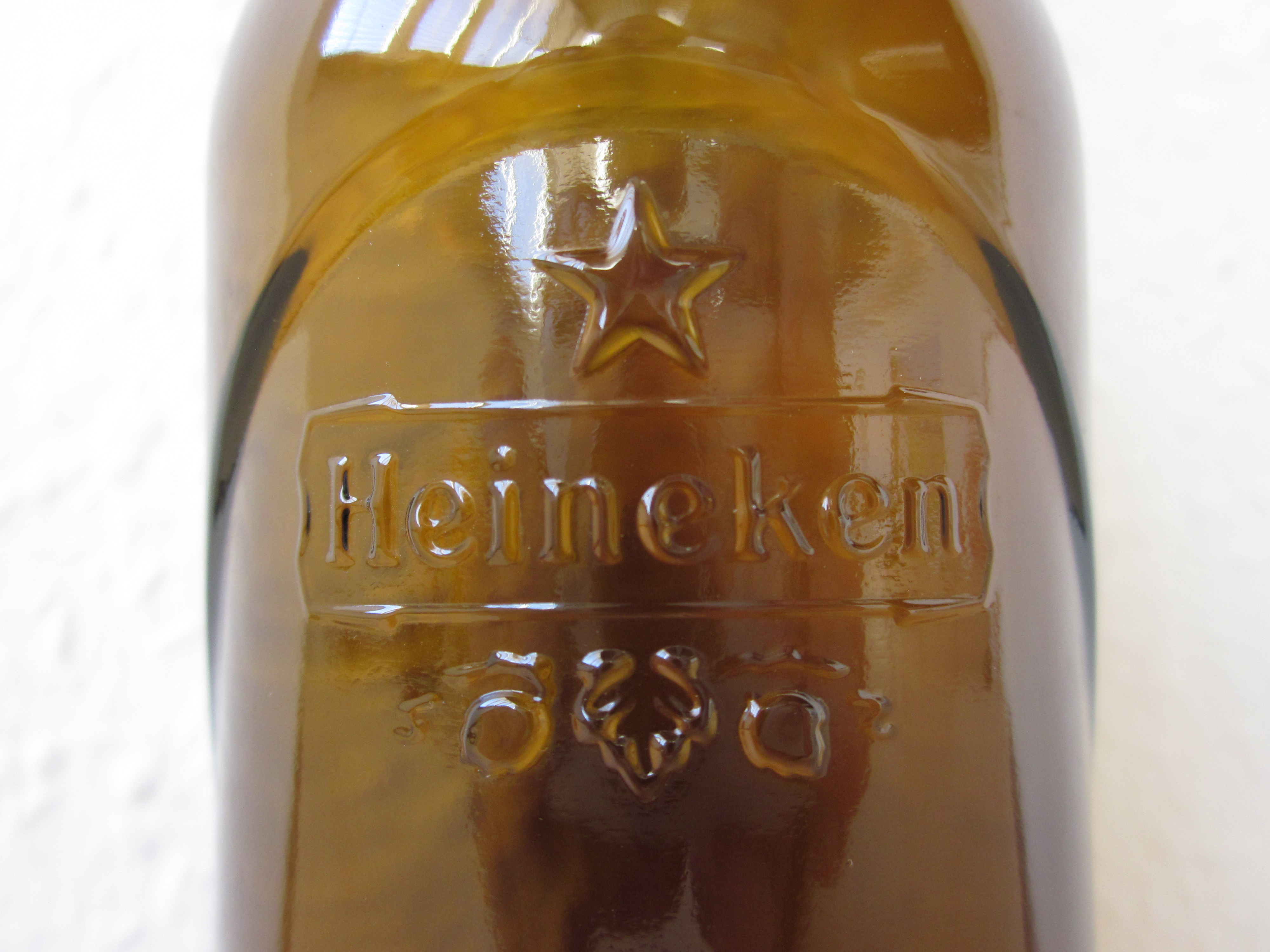 Embossing auf einer Heineken Bierflasche